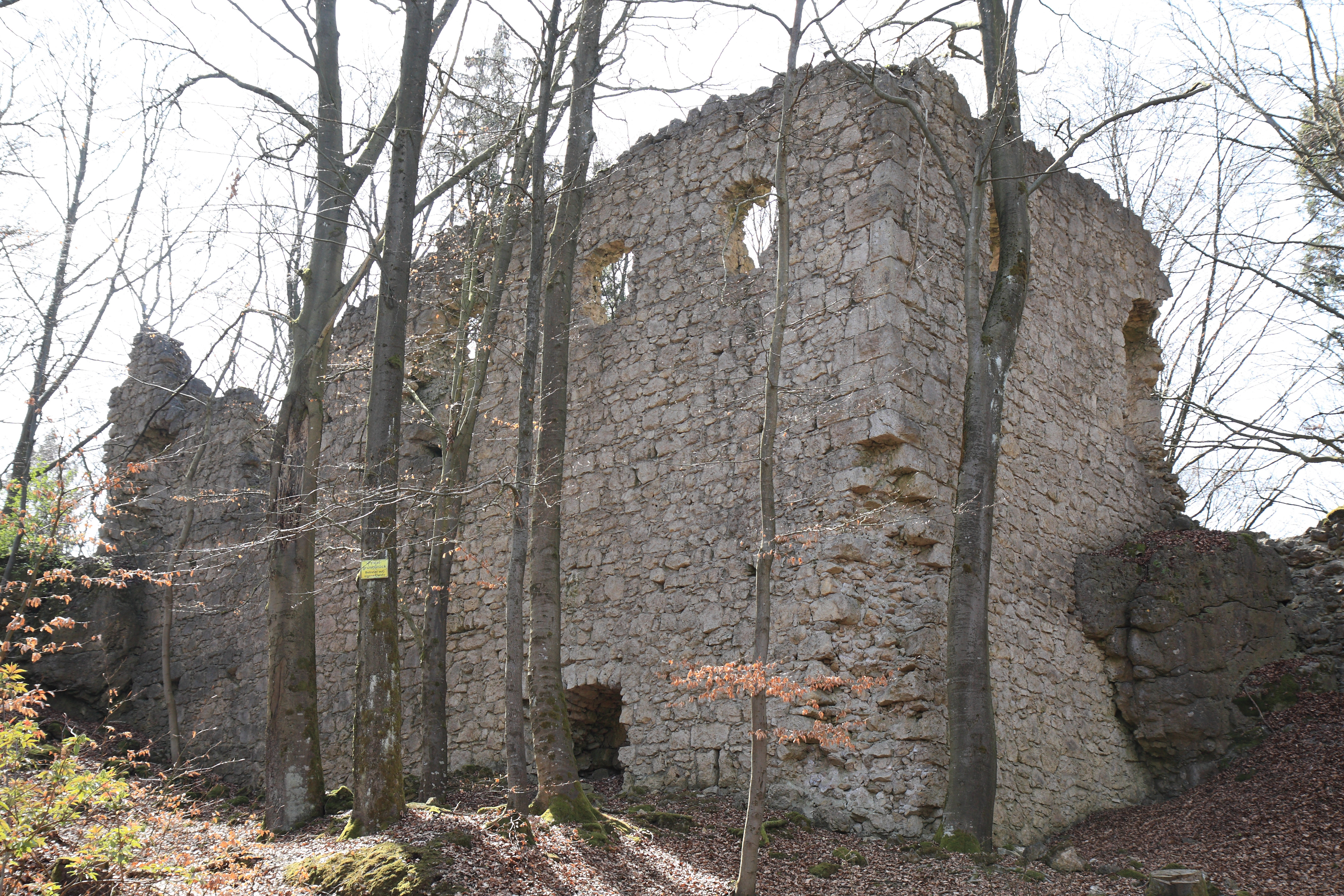 Hauptgebäude der Burgruine Poppberg